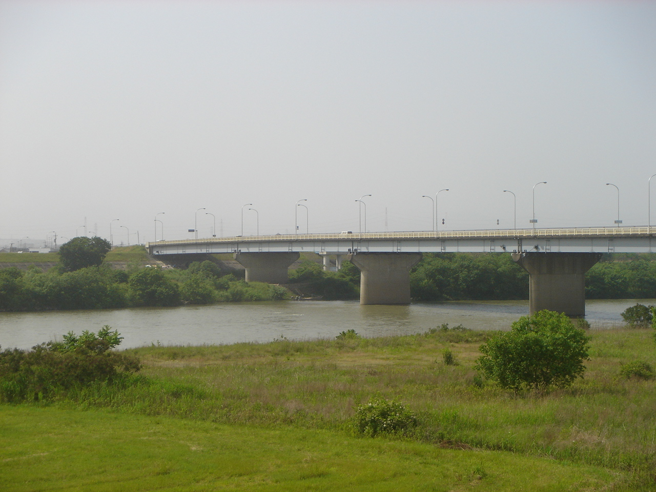 Godobashi in Gifu City(河渡橋),Gifu,Gifu,Japan(岐阜県岐阜市)で長良川左岸下流より撮影